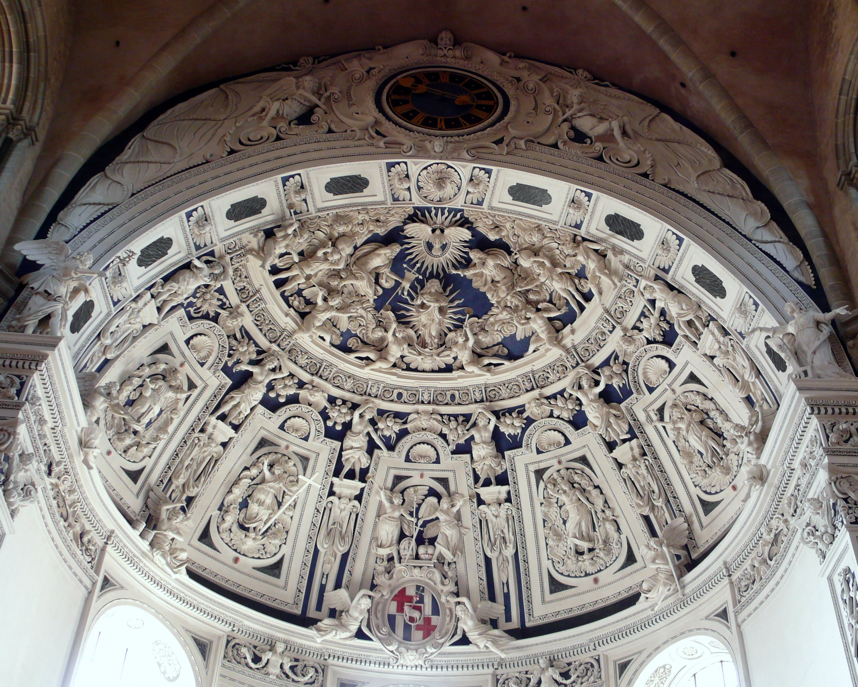 west vault of Trierer Dom